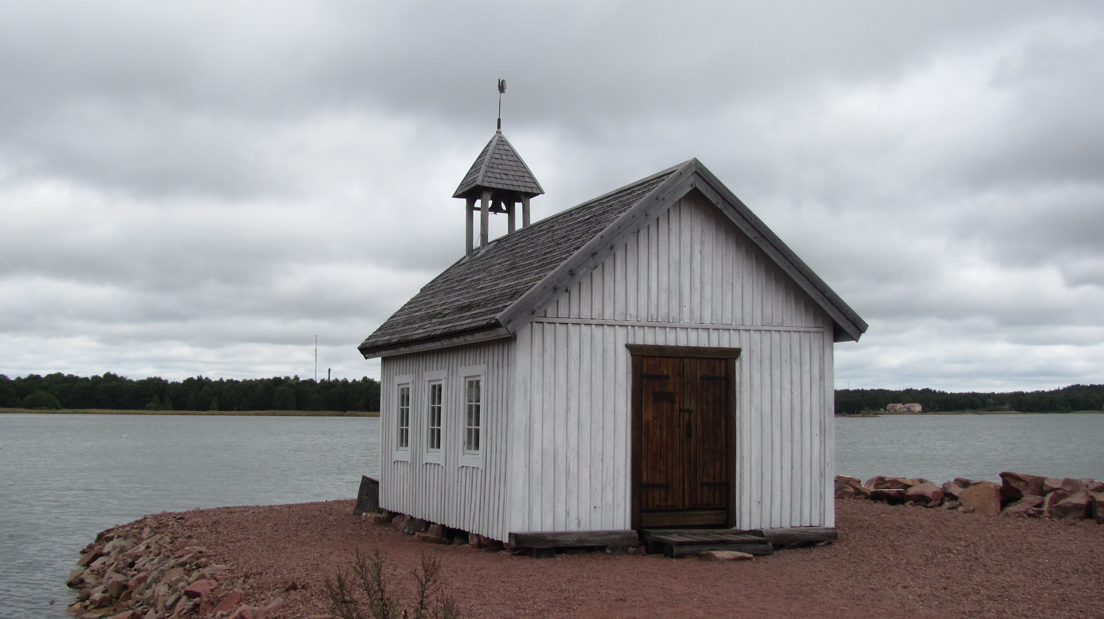 Seefahrerkapelle, Mariehamn, Fasta Aland, Finnland